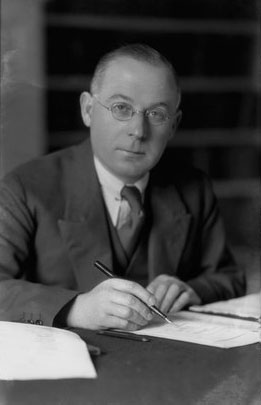 Портрет сэра Фрэнка Эзры Эдкока, сделанная Лафайетом в 1926 году